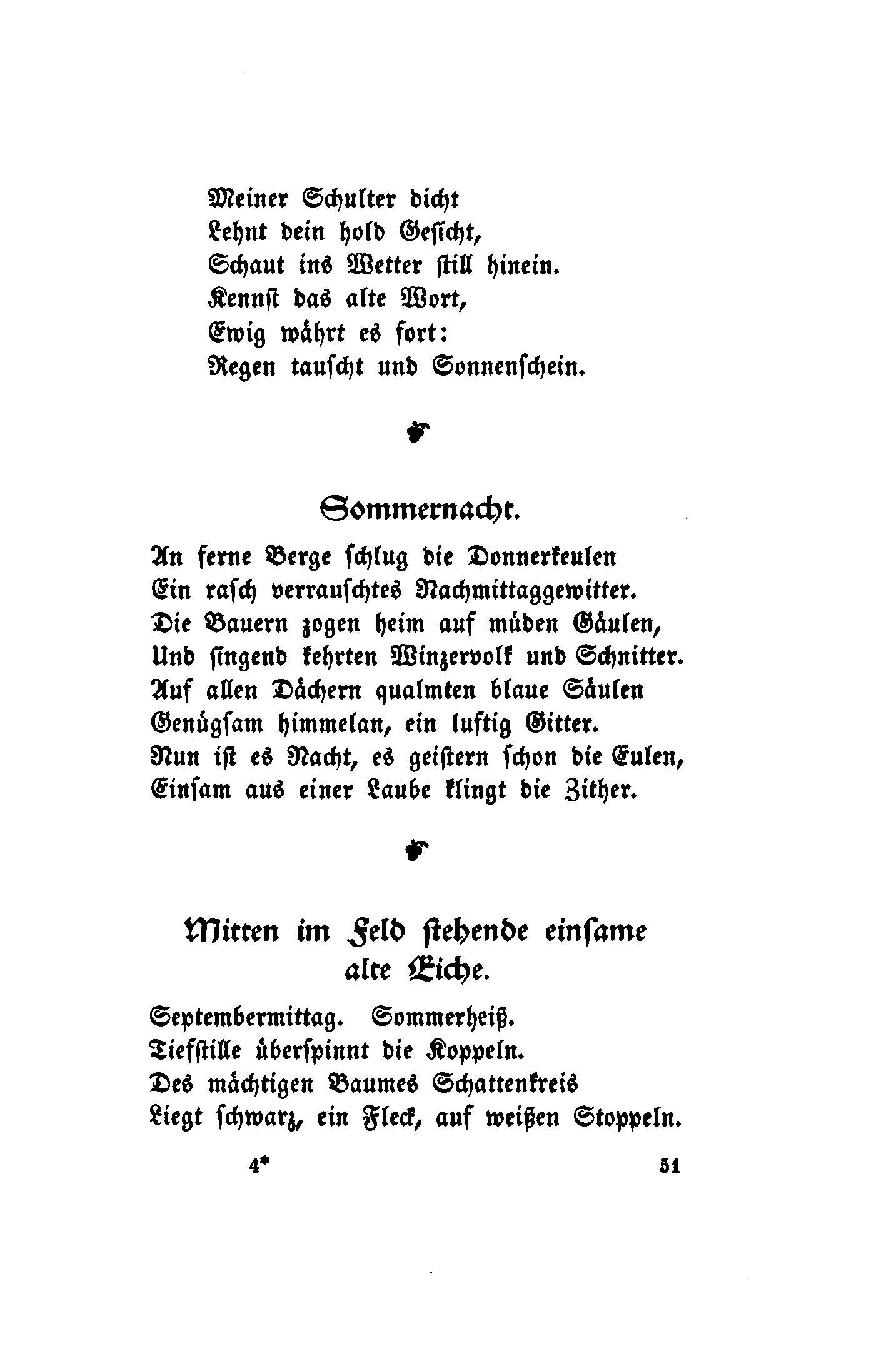 Aus: Liliencrons Gedichte. Auswahl für die Jugend. Zusammengestellt von der Lehrervereinigung zur Pflege der künstlerischen Bildung in Hamburg. Schuster & Loeffler, Berlin und Leipzig 1901, Seite 51